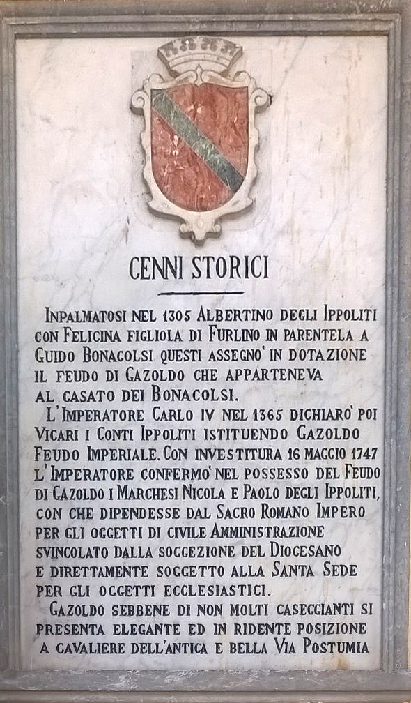 Gazoldo degli Ippoliti, lapide dedicata agli Ippoliti.